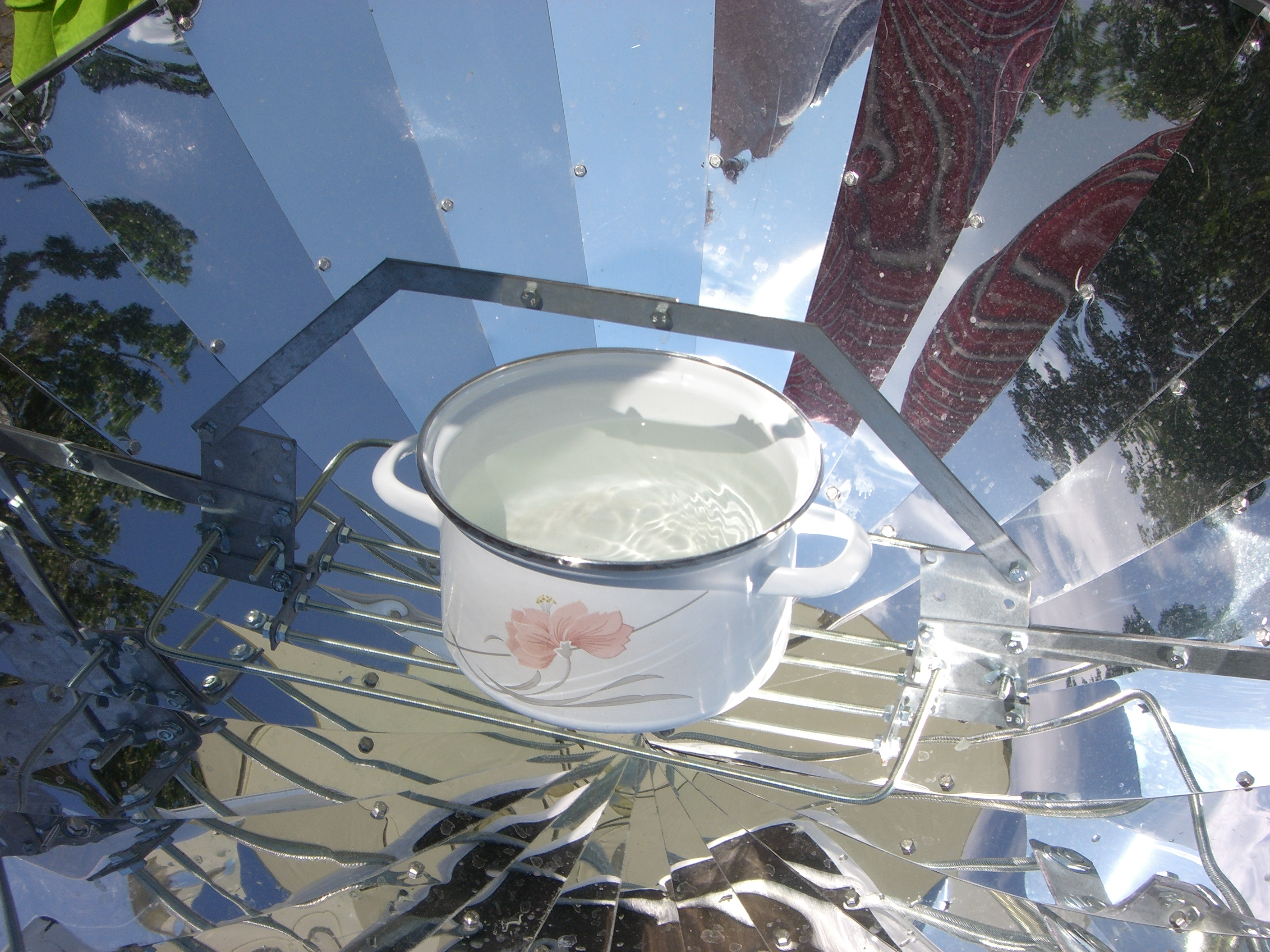 Zu erhitzender Topf im Brennpunkt des Parabolspiegels eines Solarkochers